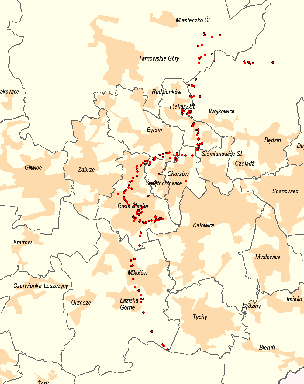 Obiekty Obszaru Warownego "Śląsk". Współrzędne obiektów na podstawie